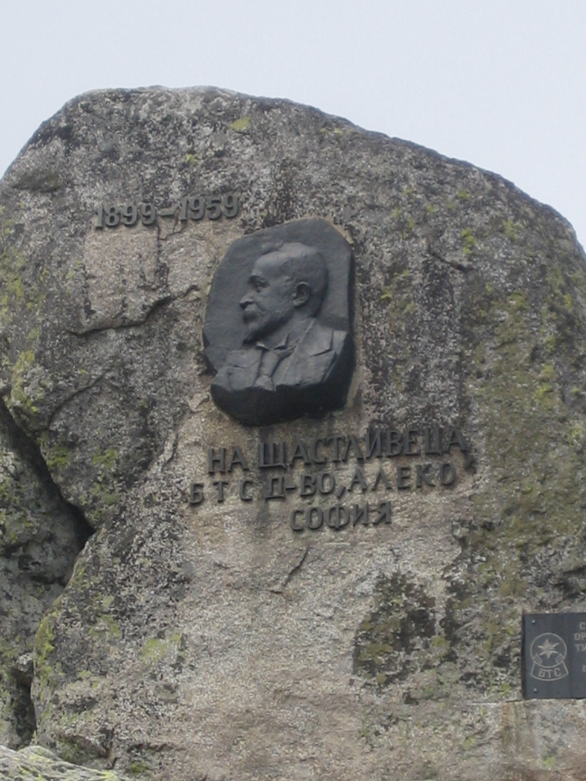 Monument à Aleko Konstantinov sur le point culminant du Vitocha